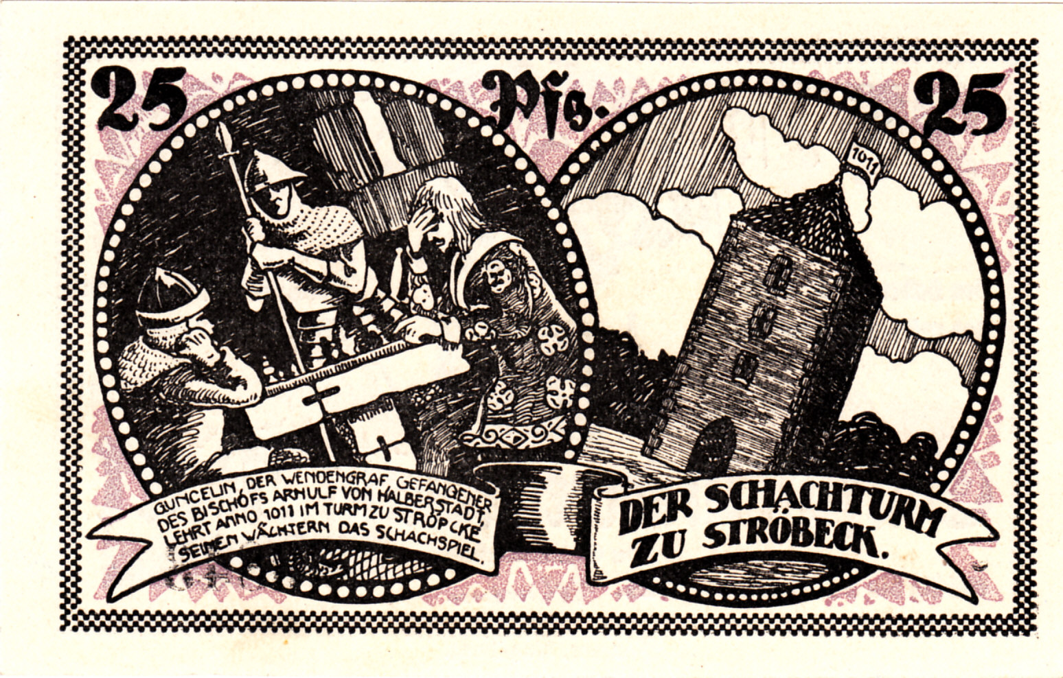 Notgeld Ströbeck, 1921, 25 Pfennig, Schachturm, emergency money